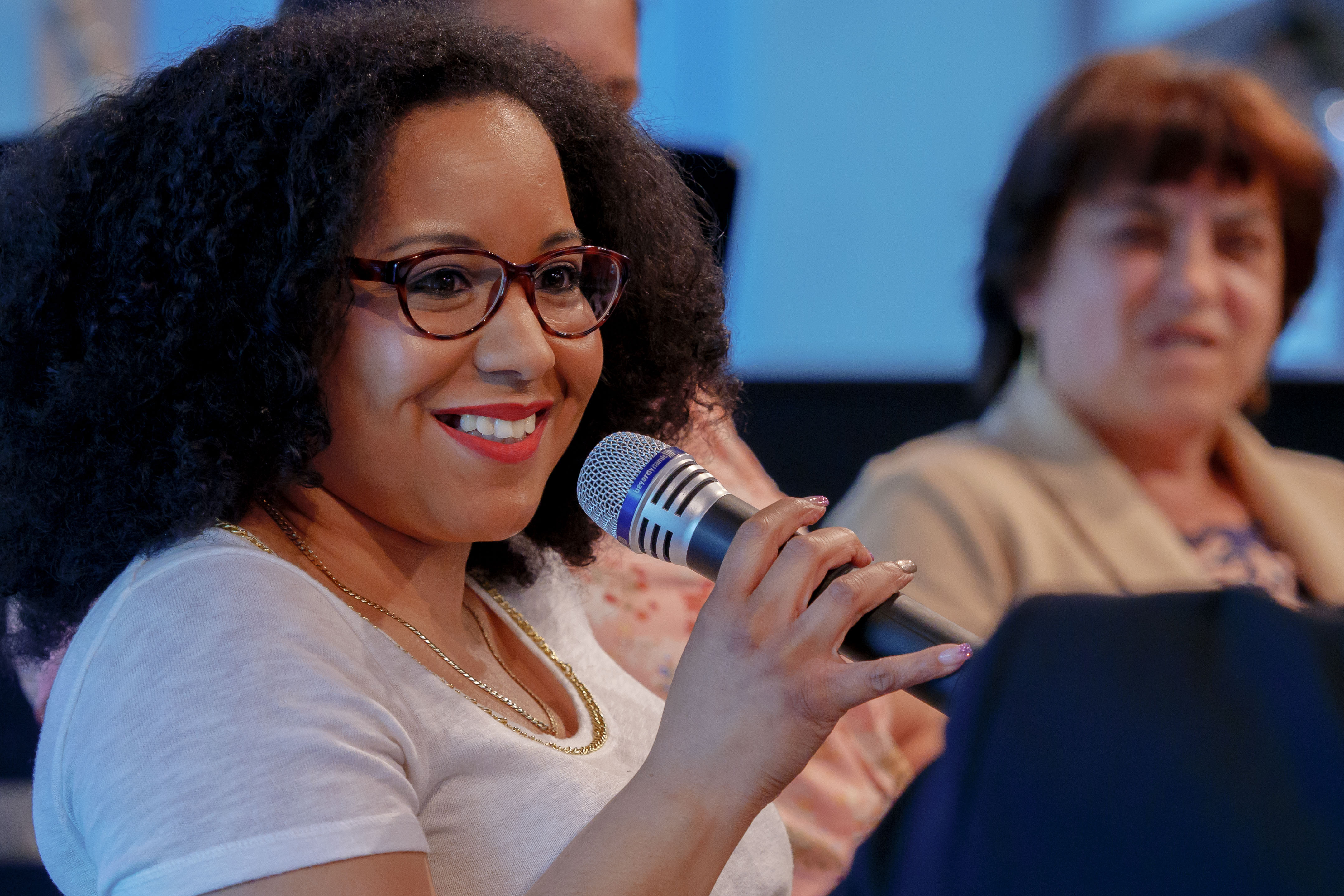 Tayo Awosusi-Onutor (Sängerin, Regisseurin, Autorin, politische Aktivistin) Foto: Bodo Gierga